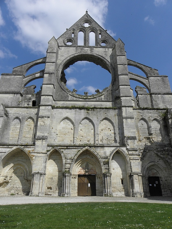 Façade occidentale de l'abbatiale de Longpont (02).